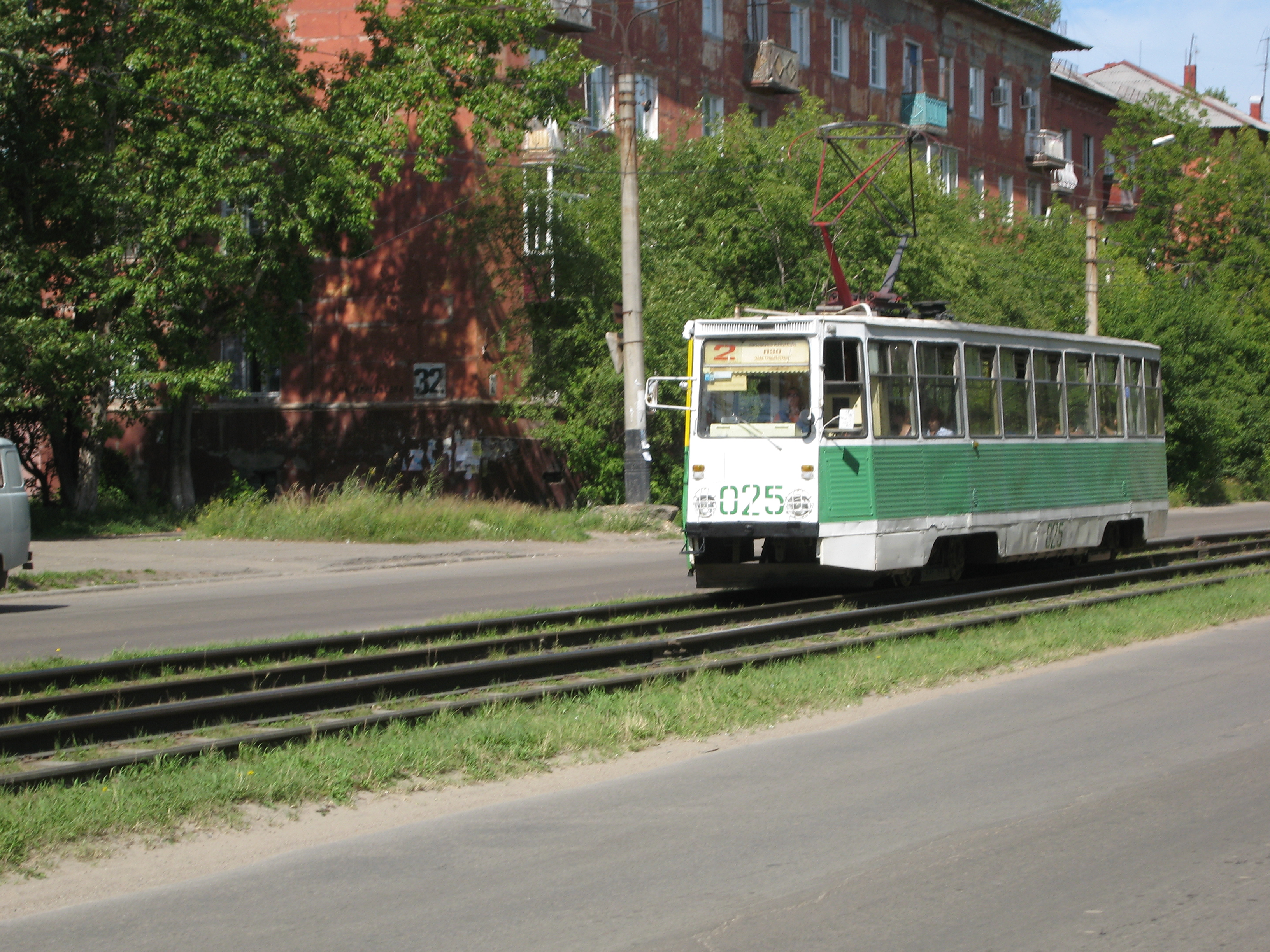 Трамвай КТМ-5 на ул. Менделеева в г. Усолье-Сибирское